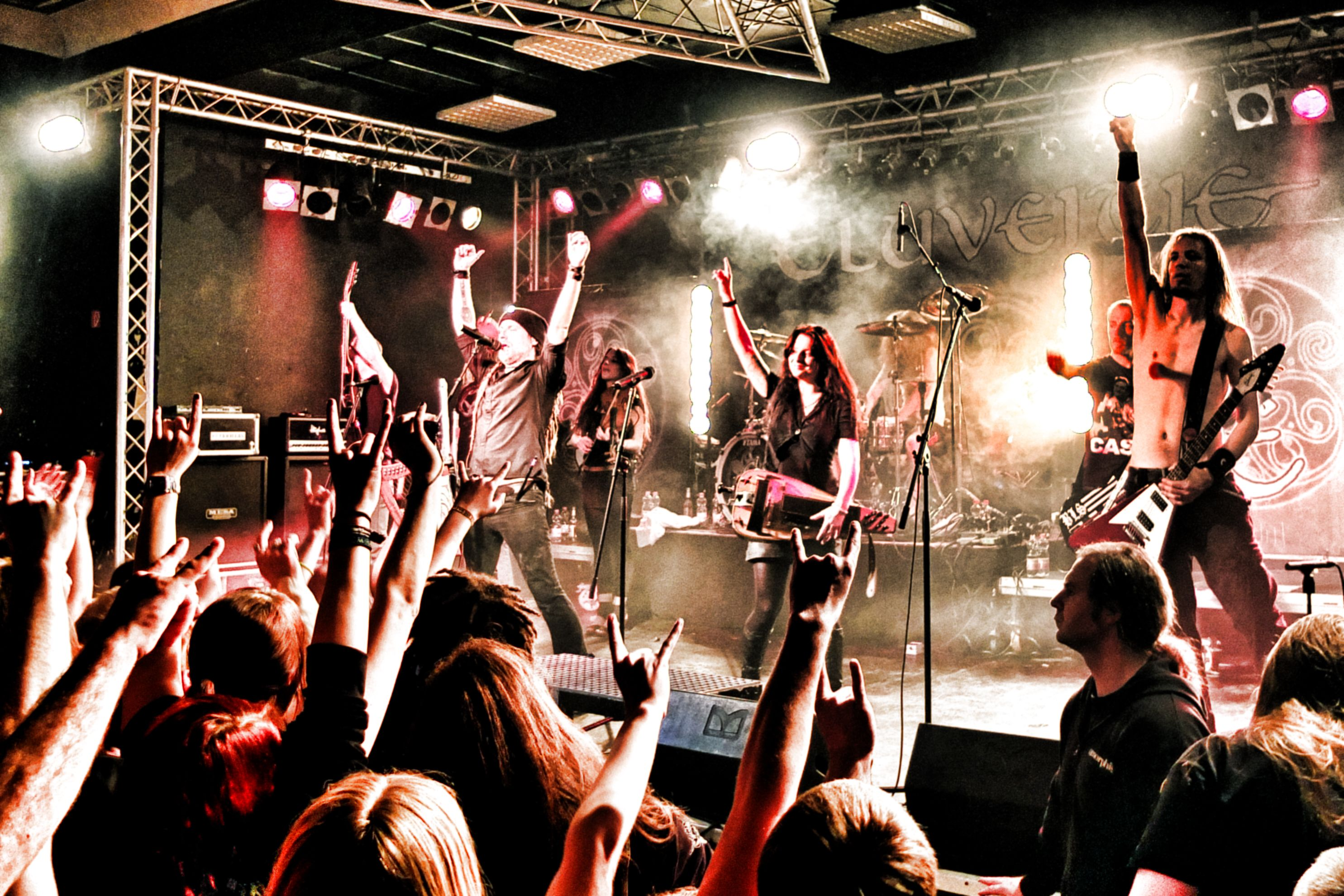 Eluveitie - Paganfest 2012 - Leipzig Hellraiser raise your fist ! X10 28mm | f/2,0 | 1/60 | ISO400 | gegl c2g